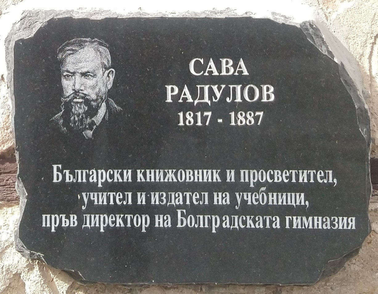 Сава Радулов (1817 - 1887) - плоча в Исторически музей Панагюрище - Надпис: Български книжовник и просветител, учител и издател на учебници, пръв директор на Болградската гимназия.